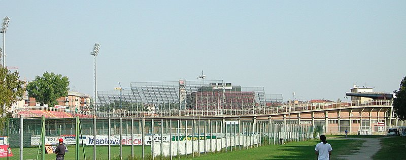 Stadio Danilo Martelli della Associazione Calcio Mantova Source: photo uploaded by User:RicciSpeziari. Photographer: Riccardo Speziari